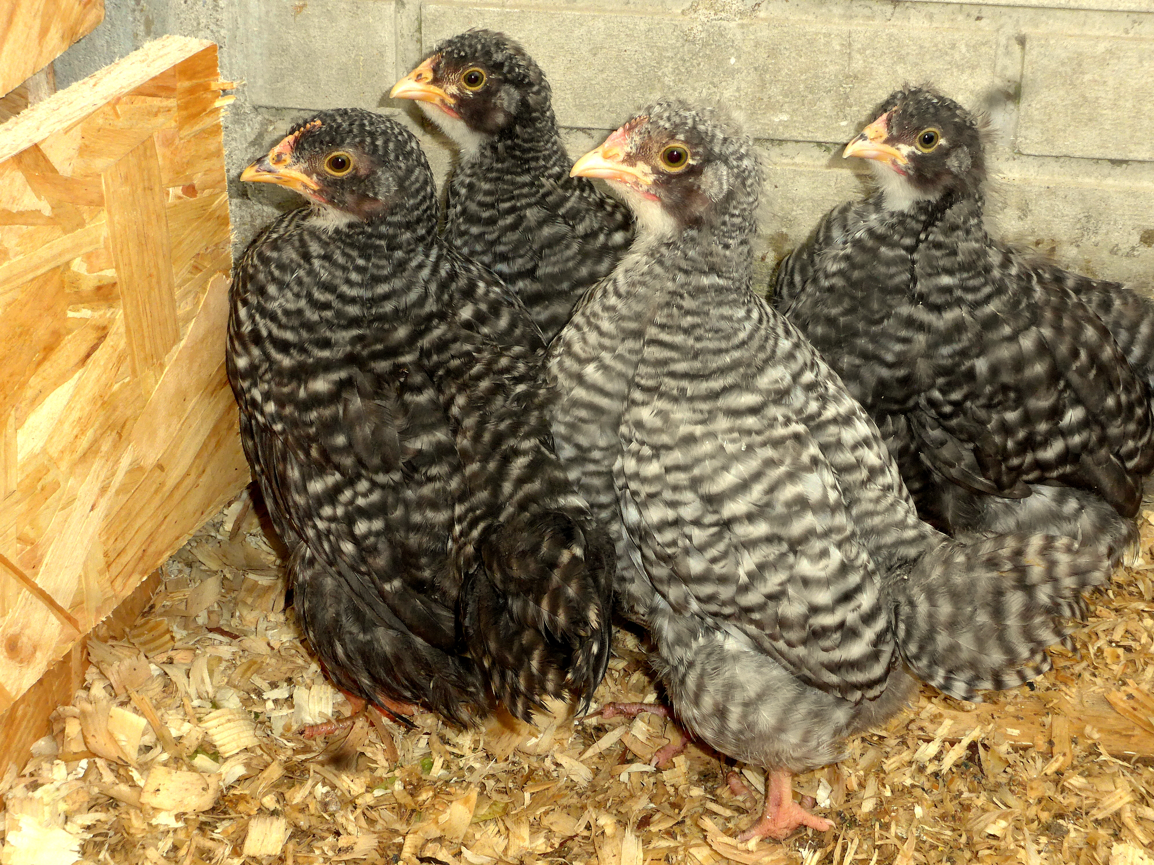 Noord Hollands Blauw, kuikens, 6 weken, kleurverschil haantje en hennetjes